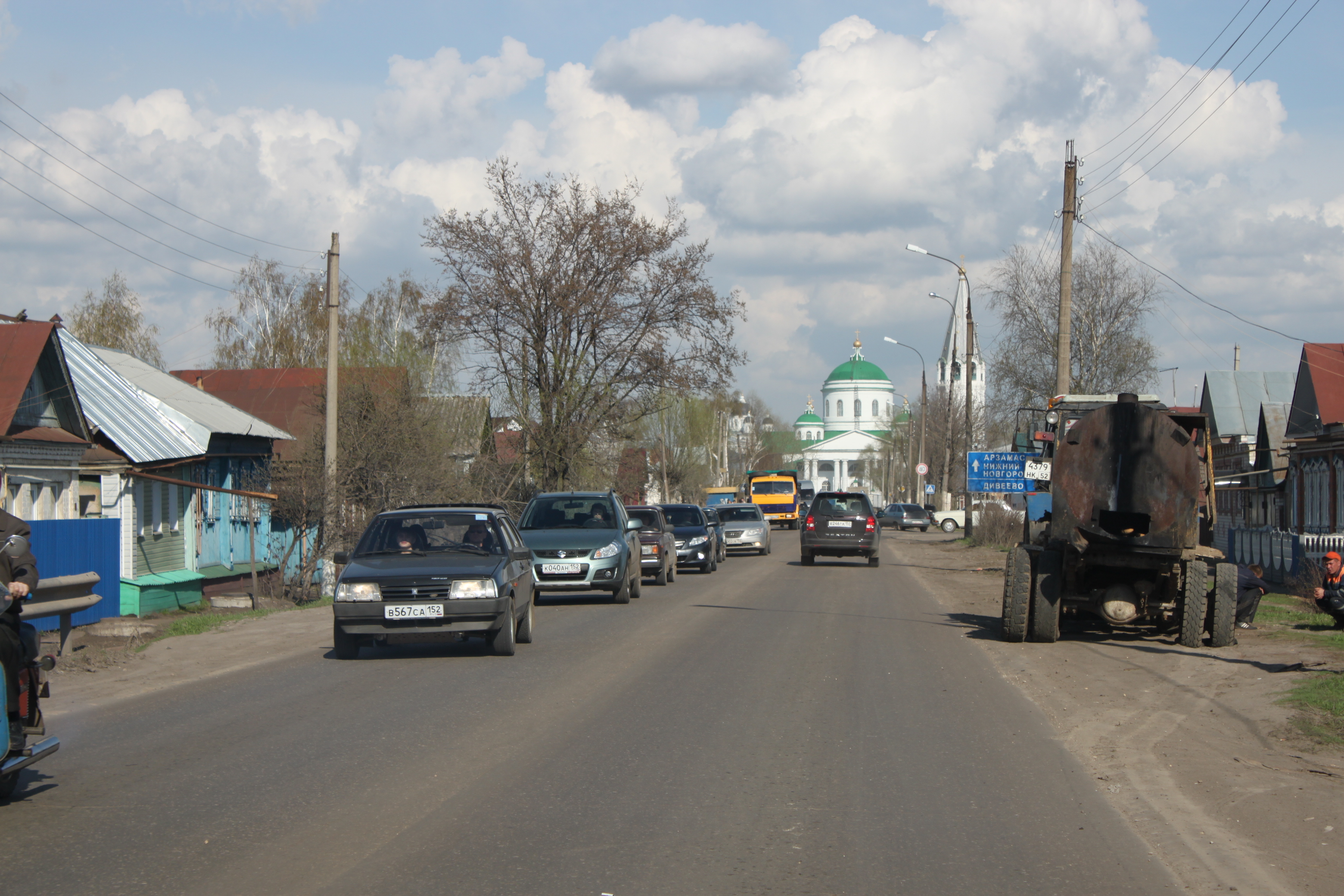 Выездное Арзамасский район улица Ленина